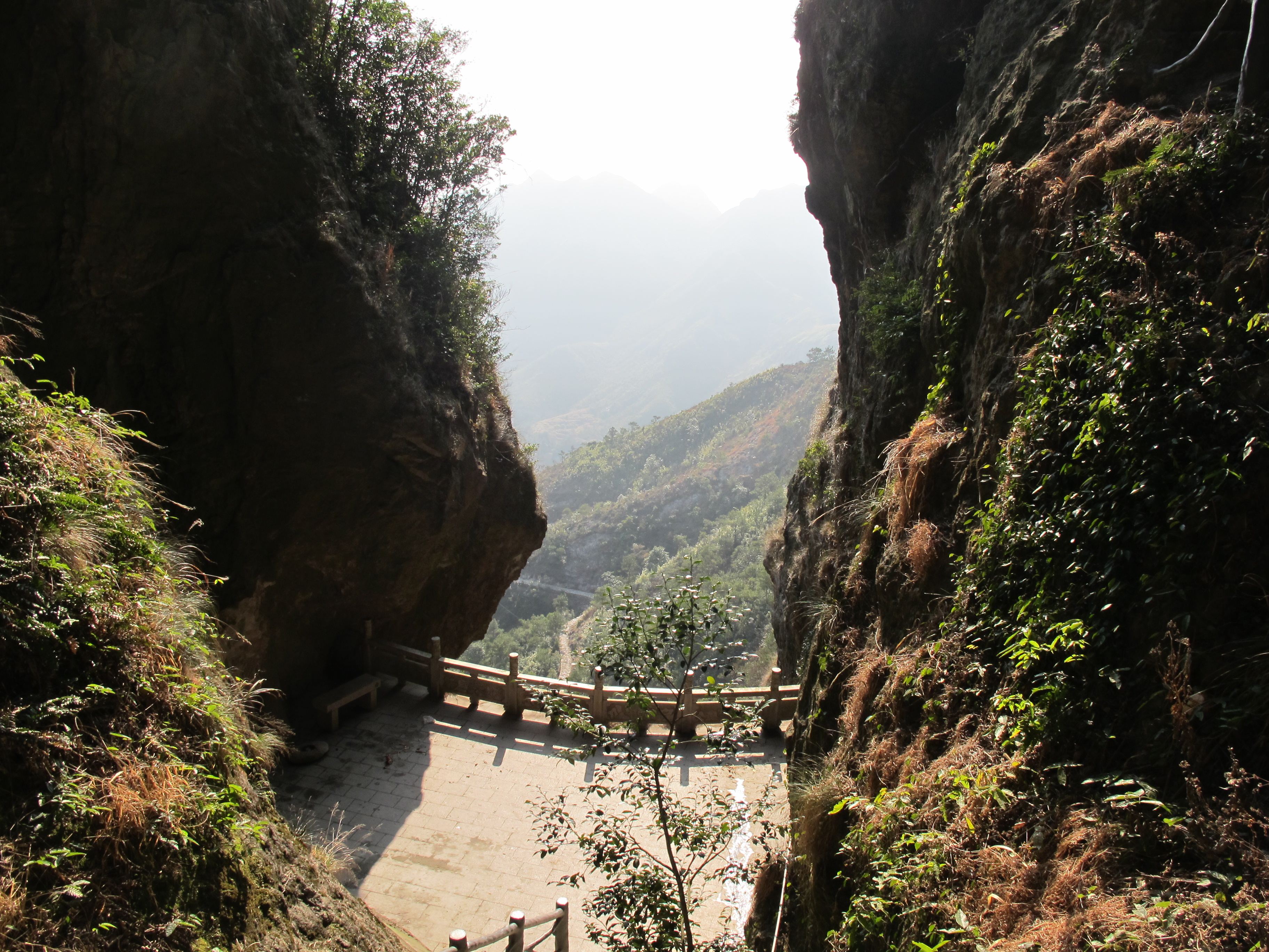 中雁云街观景台